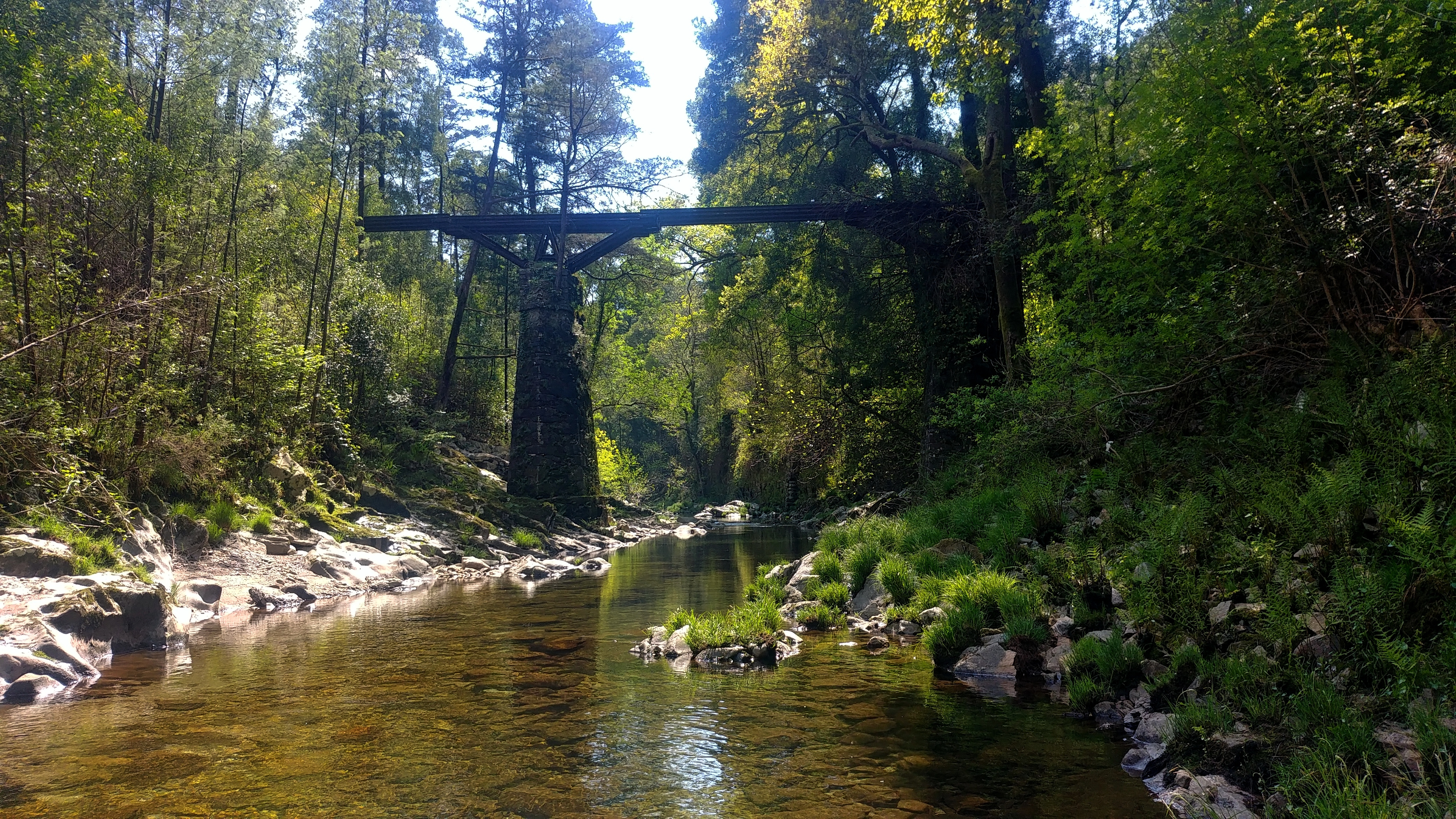 Ponte de carris de ferro sobre o rio Caima.